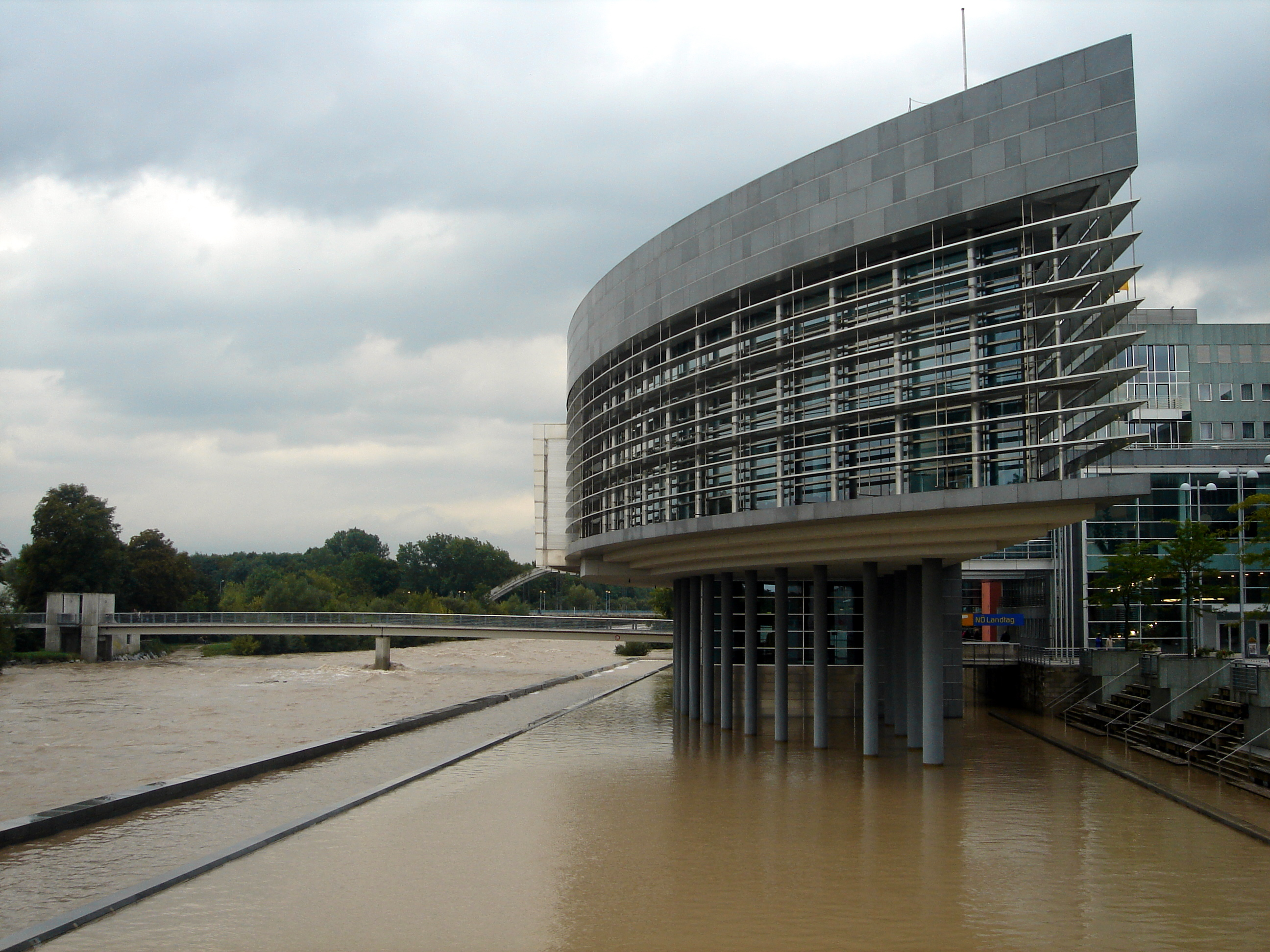 Das Landhausschiff in St.Pölten nach einem Hochwasser